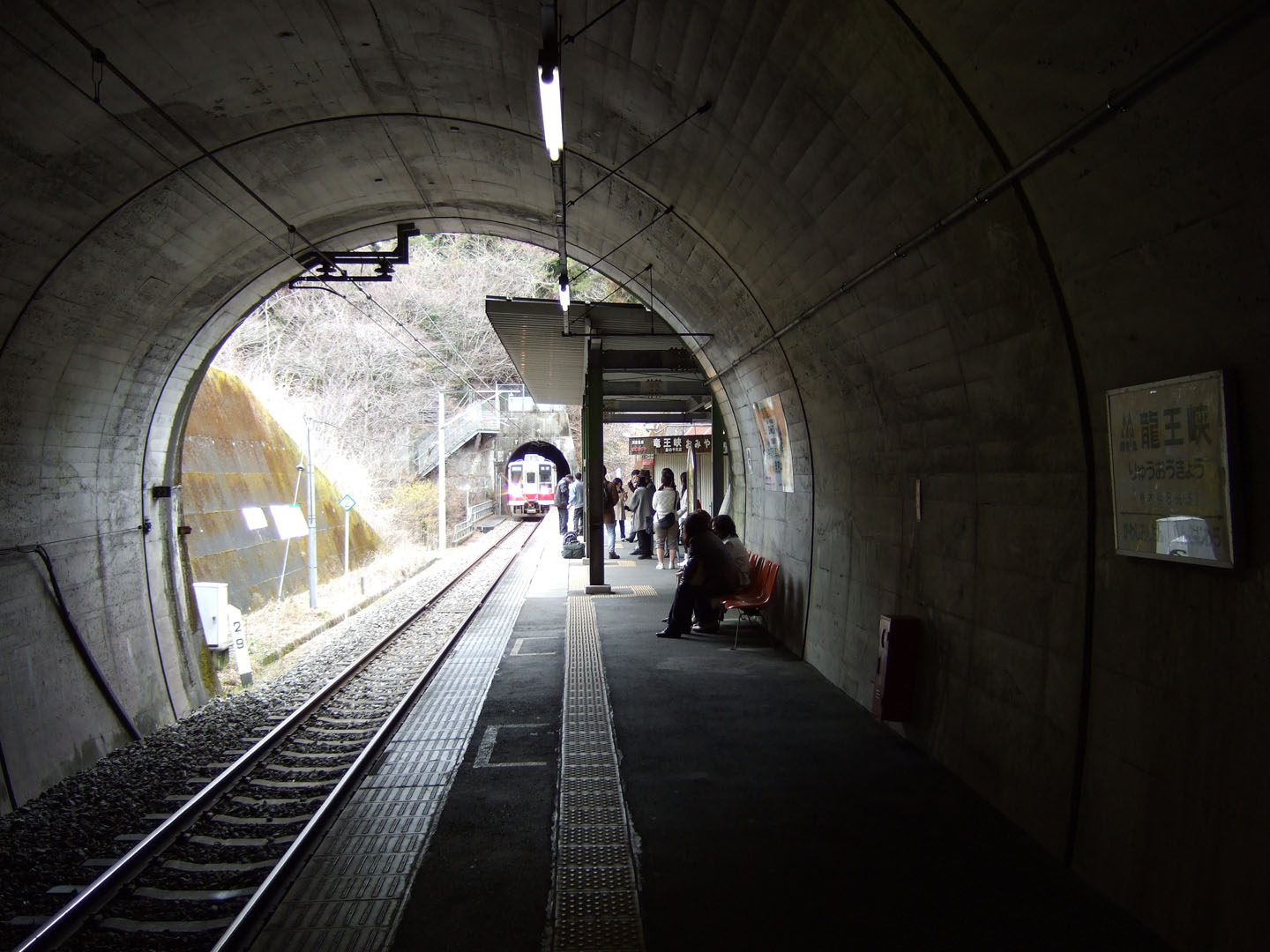 Ryuokyo Station, Japan 龍王峡駅